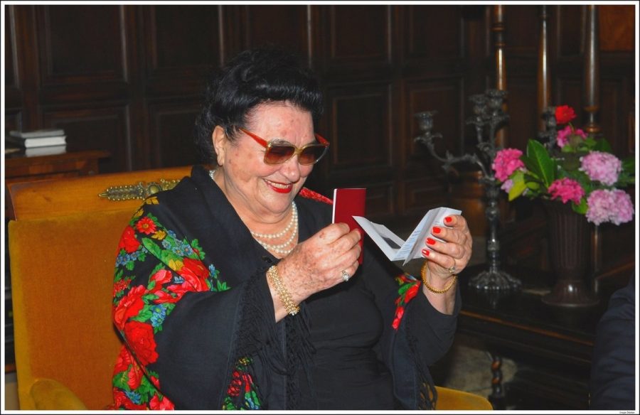 Госпођа Јованка Броз први пут добила пасош и личну карту. Овај осмех ћу упамтити за читав живот. Историјски догађај којем сам присуствовао.